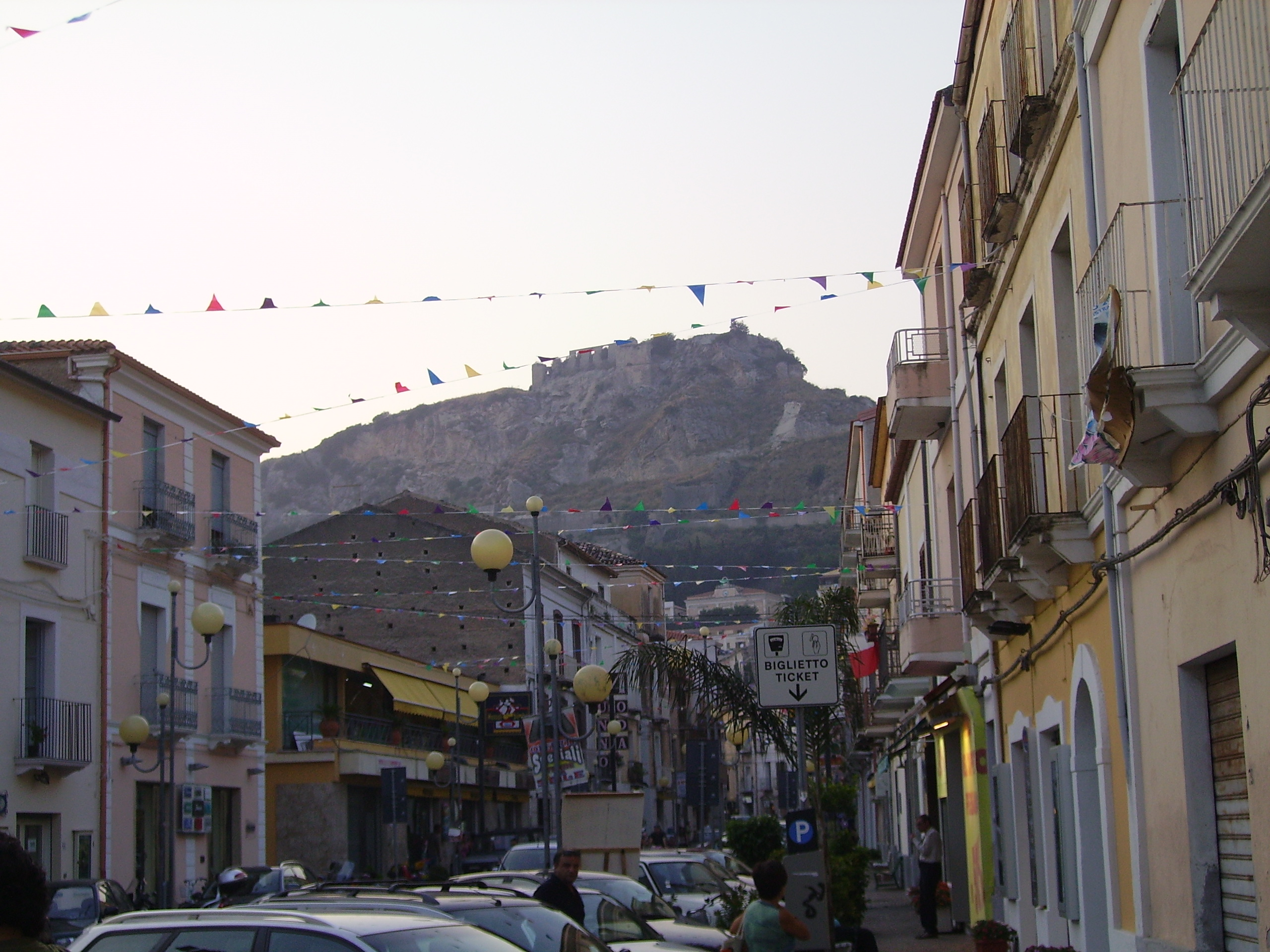 Corso Margherita con la Rocca